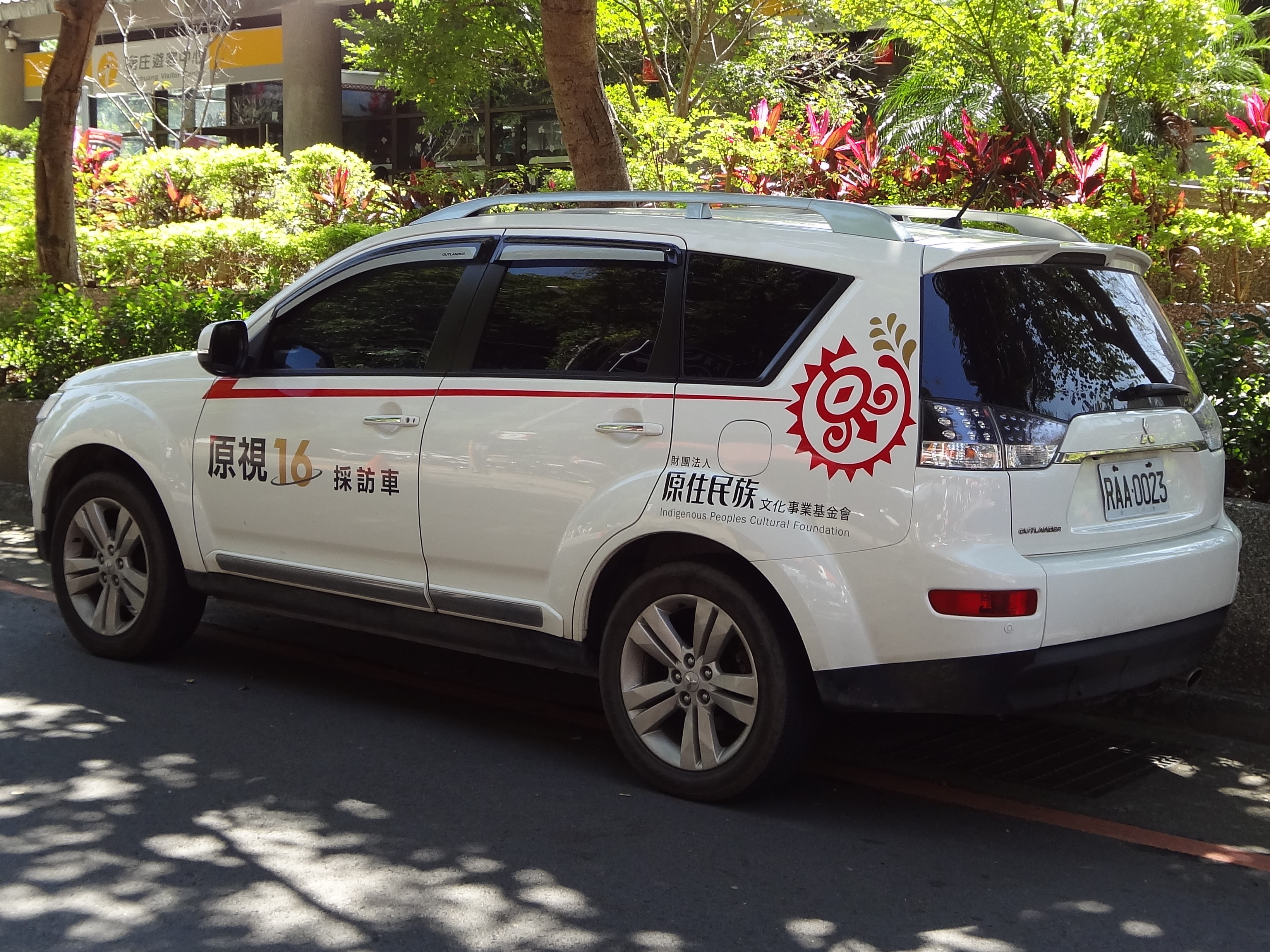 原住民族電視台三菱Outlander採訪車RAA-0023停在苗栗縣南庄鄉南庄遊客中心前。